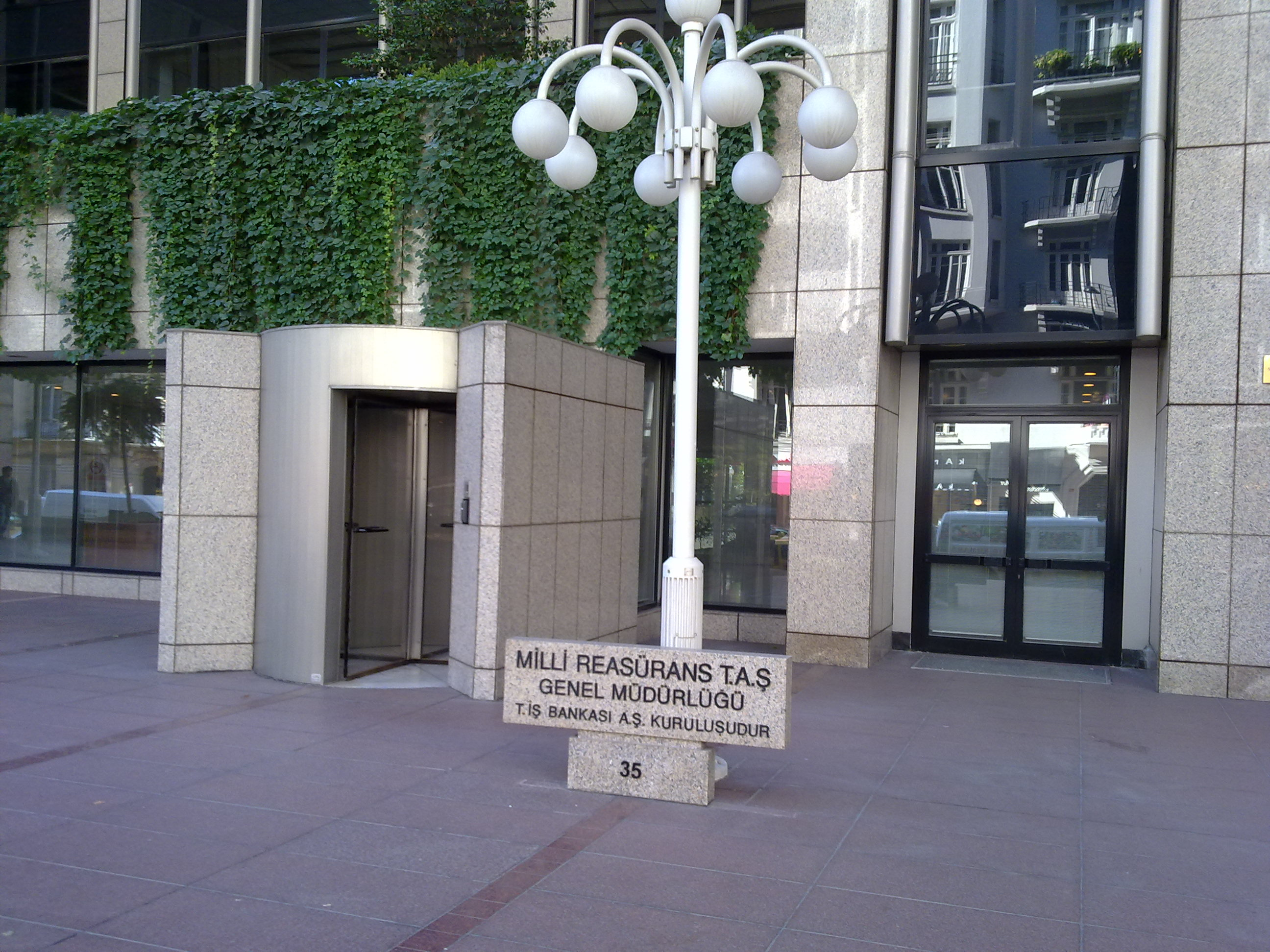 Millî Reasürans - İş Bankası